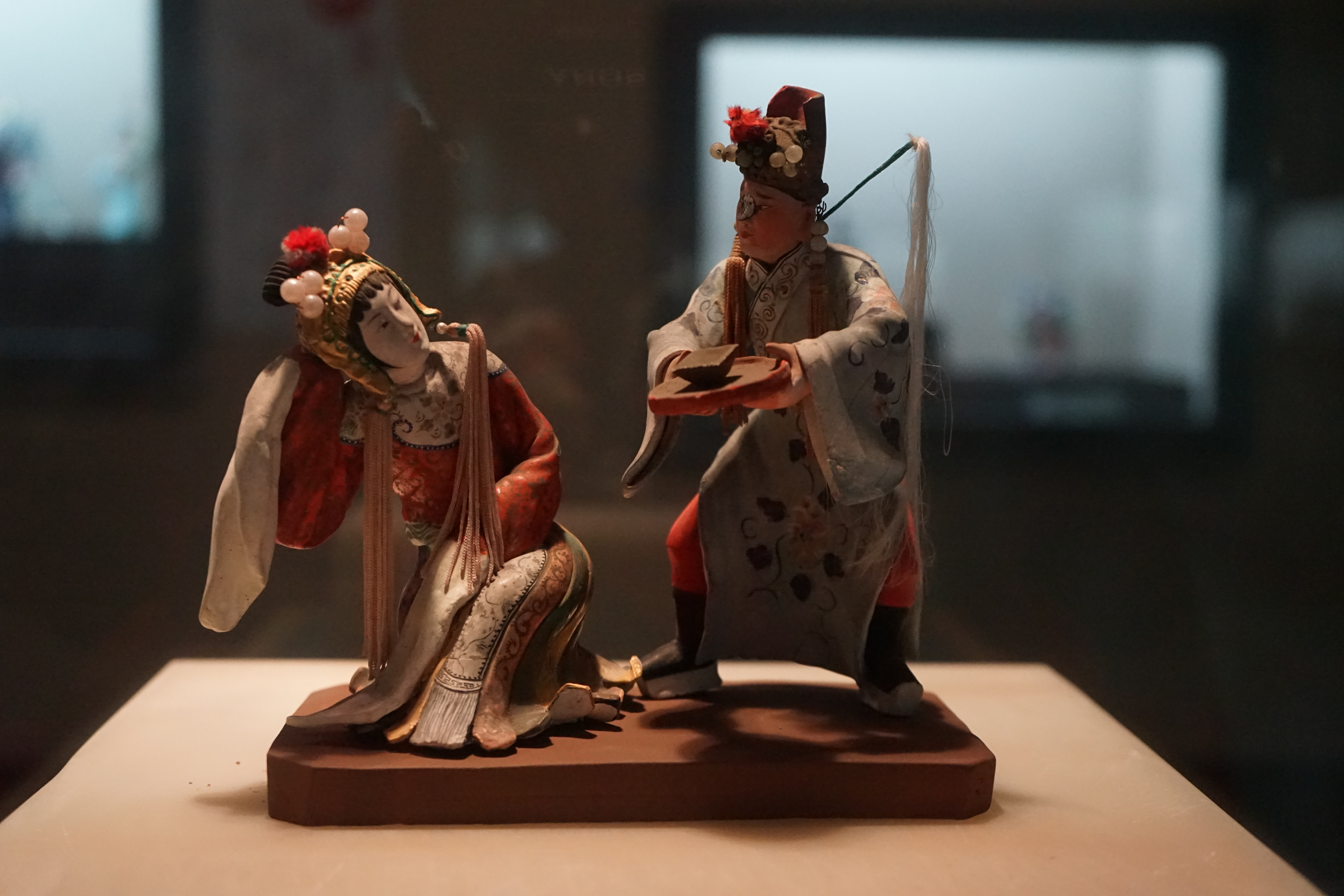 中文（中国大陆）: 《贵妃醉酒》蒋子贵、陈毓秀 无锡博物馆